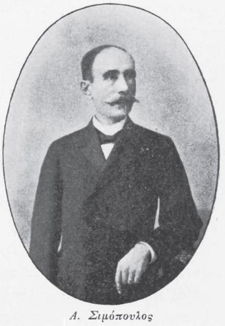 Griechischer Politiker, 19. Jahrhundert